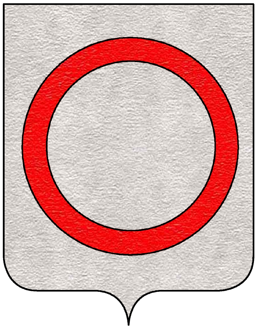 Stemam della famiglia Barbaro